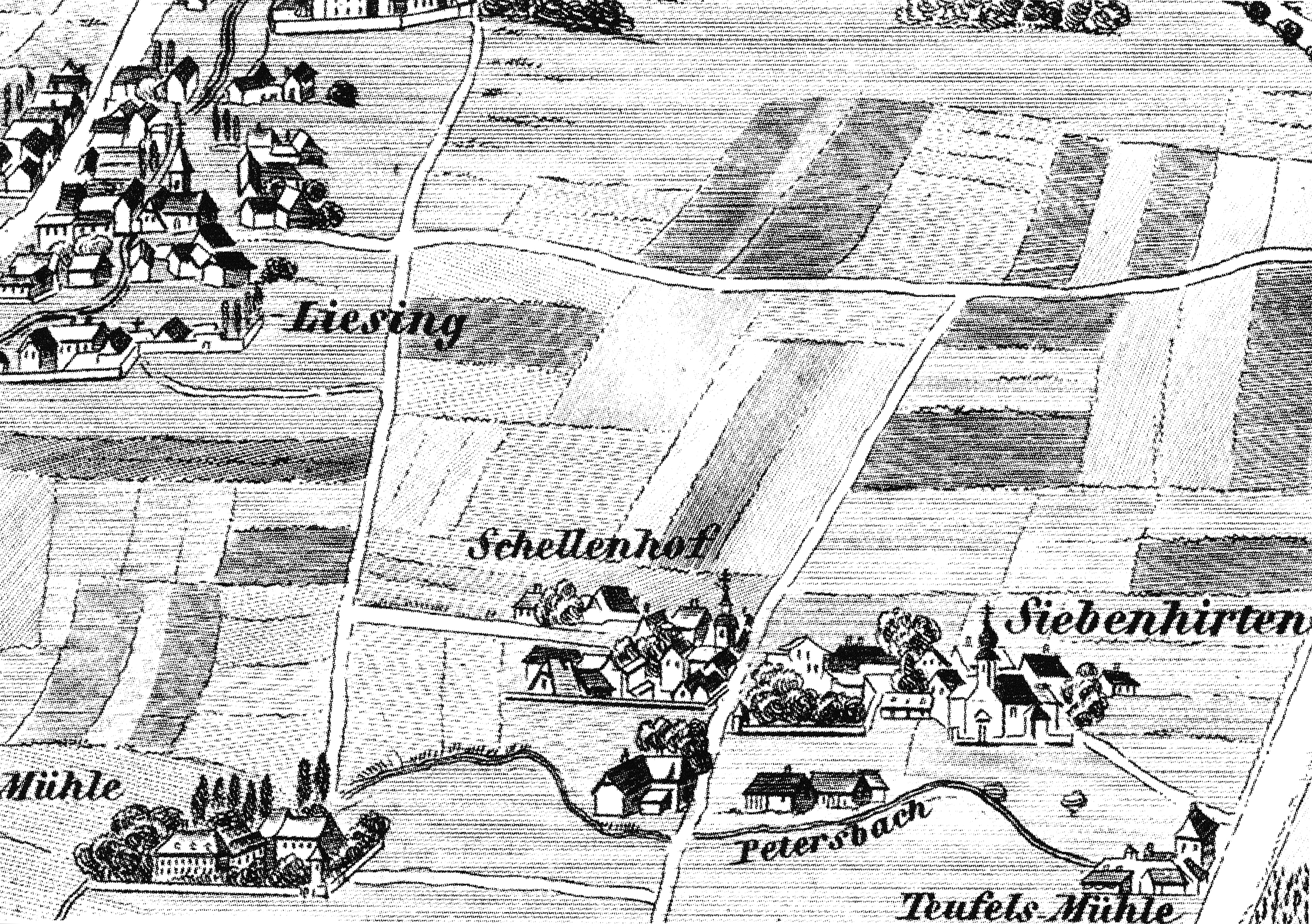 Siebenhirten und Schellenhof: Ausschnitt aus: Franz Xaver Schweickhardt, Perspectiv-Karte des Erzherzogtums Österreich unter der Enns, Section IV